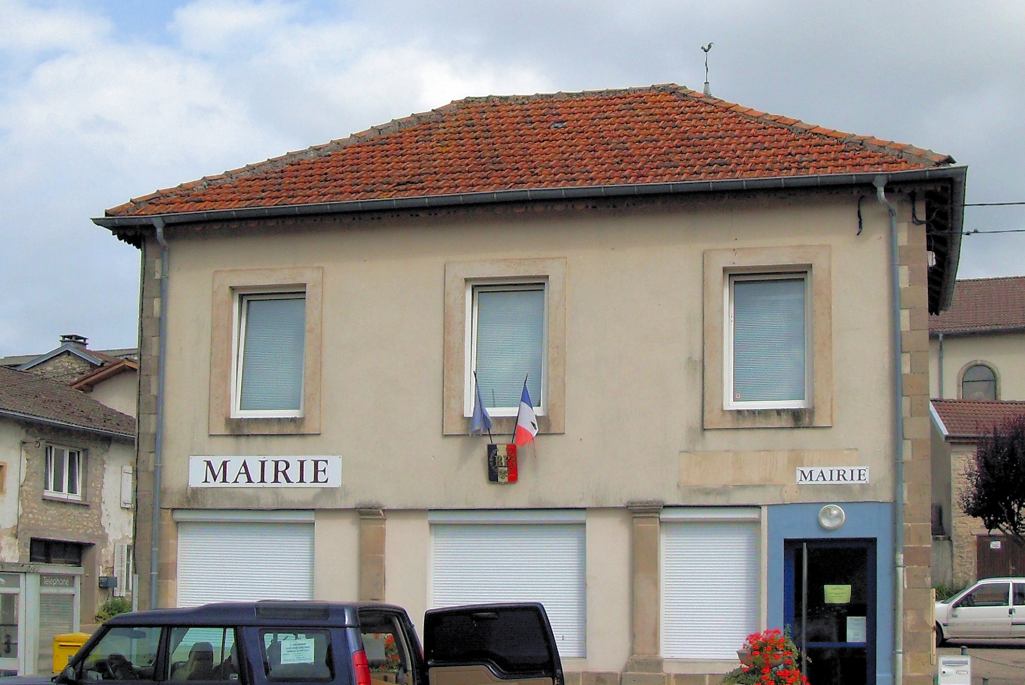 La mairie de Bettegney-Saint-Brice